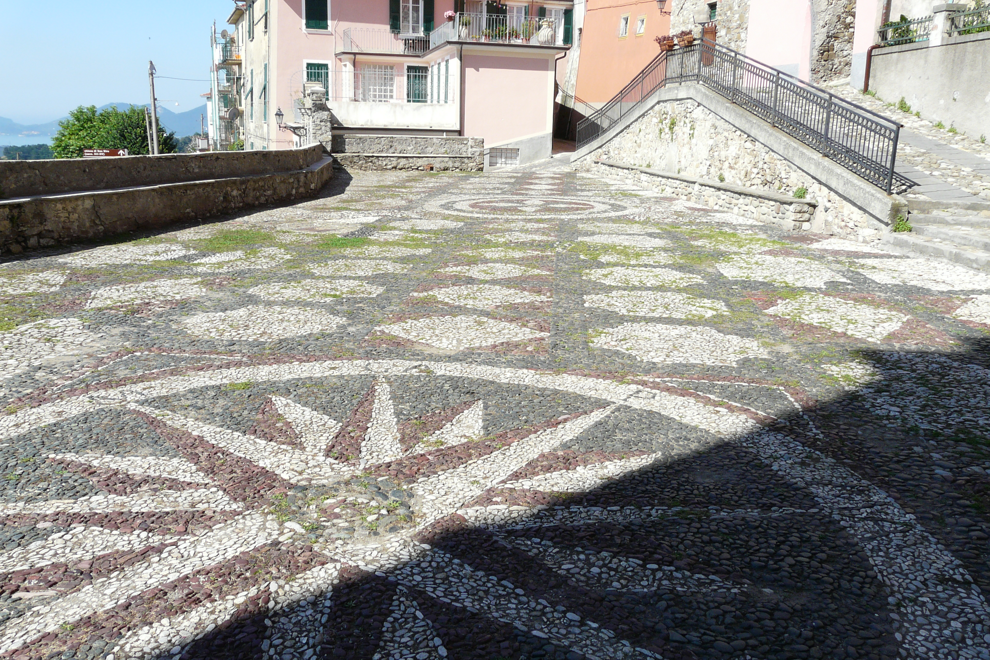 Sagrato della Chiesa di Nostra Signora del Soccorso, Vezzano Superiore, Liguria, Italia